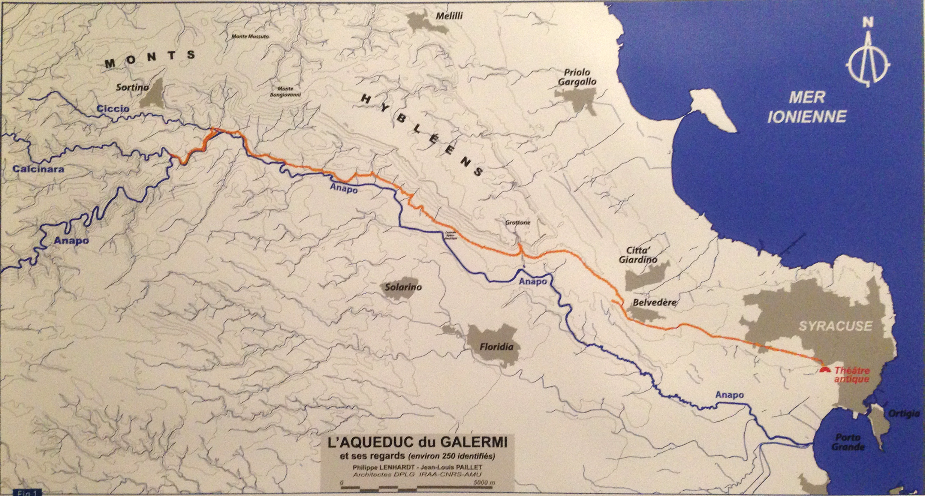 Percorso dell'acquedotto Galermi